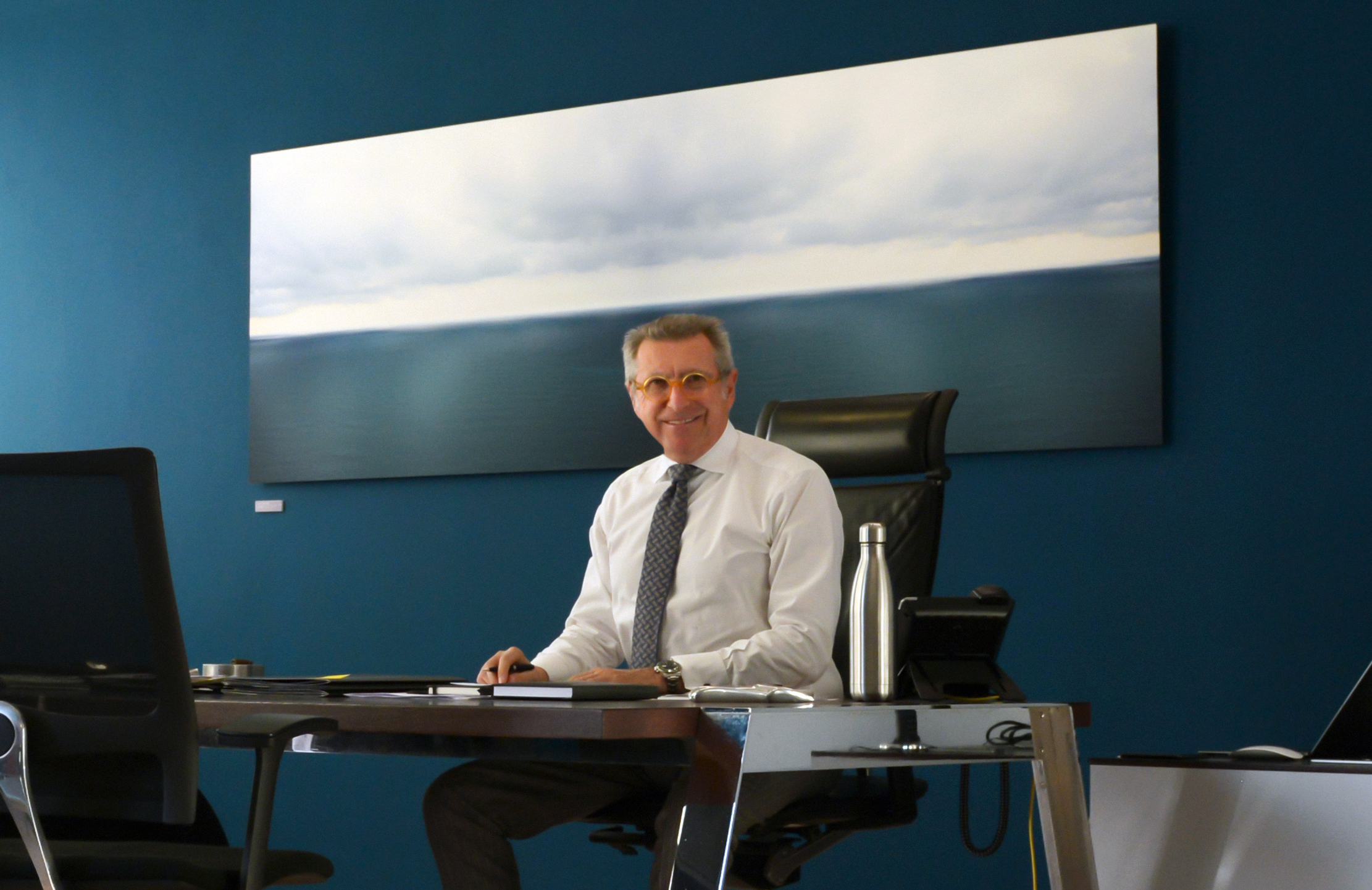 Ufficio Villa Gualino - Fotografo: Angela Pietribiasi